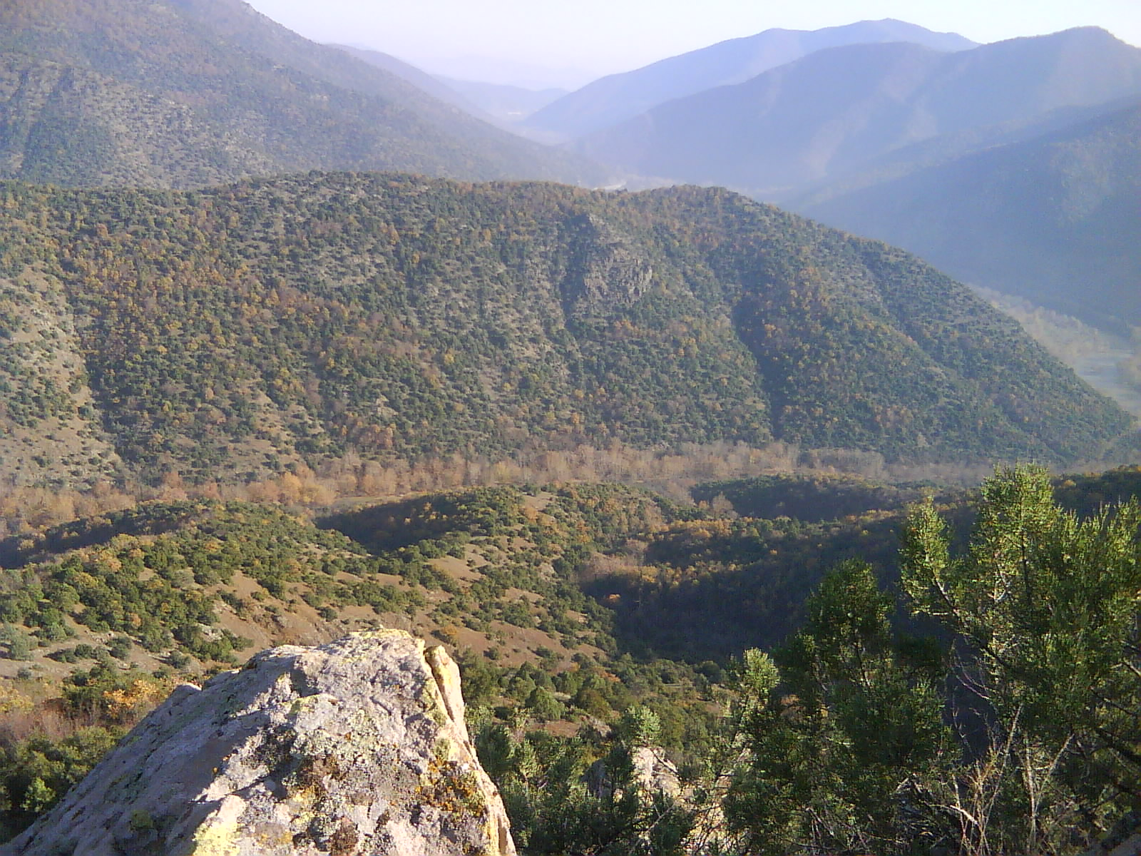 Pogled po dolinata na Vardar od Кaradag, vo blizina na seloto Gradec.